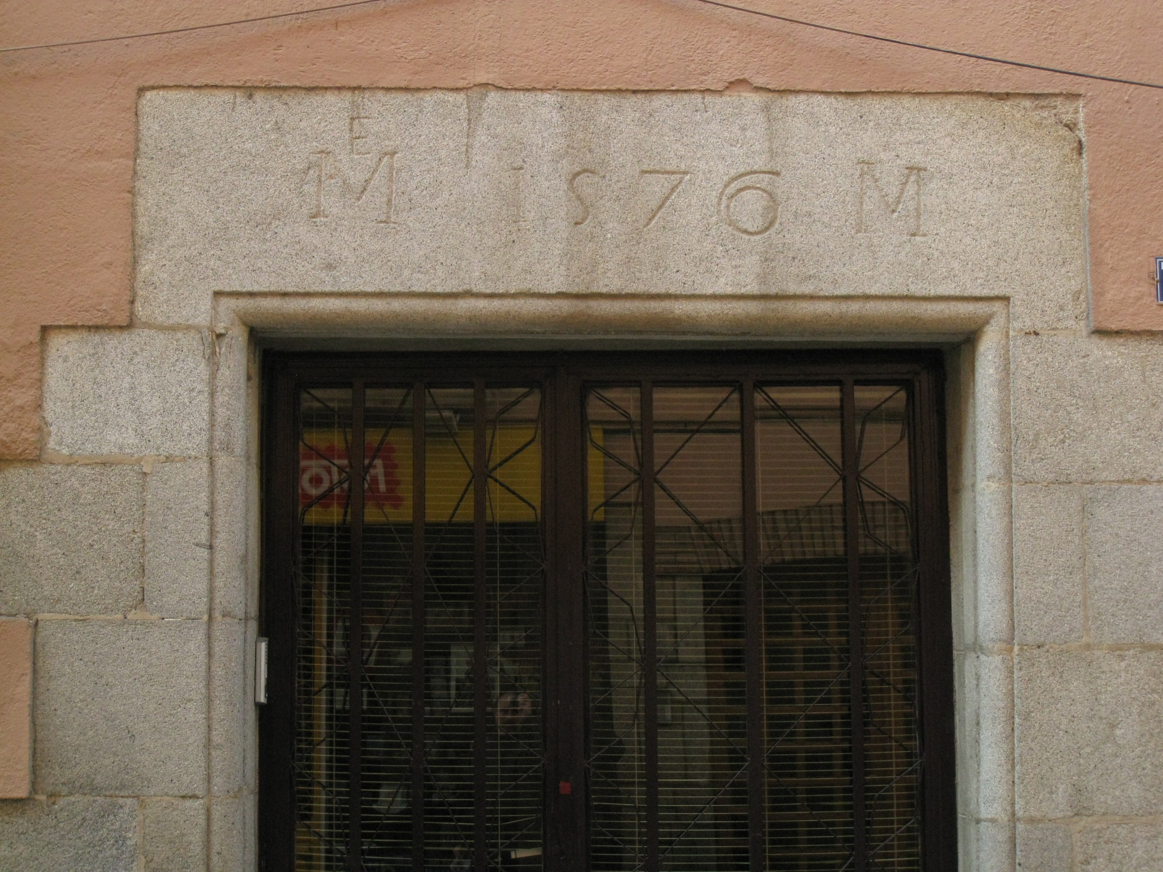 Can Bosch, llinda del segle XVI (Sant Celoni)